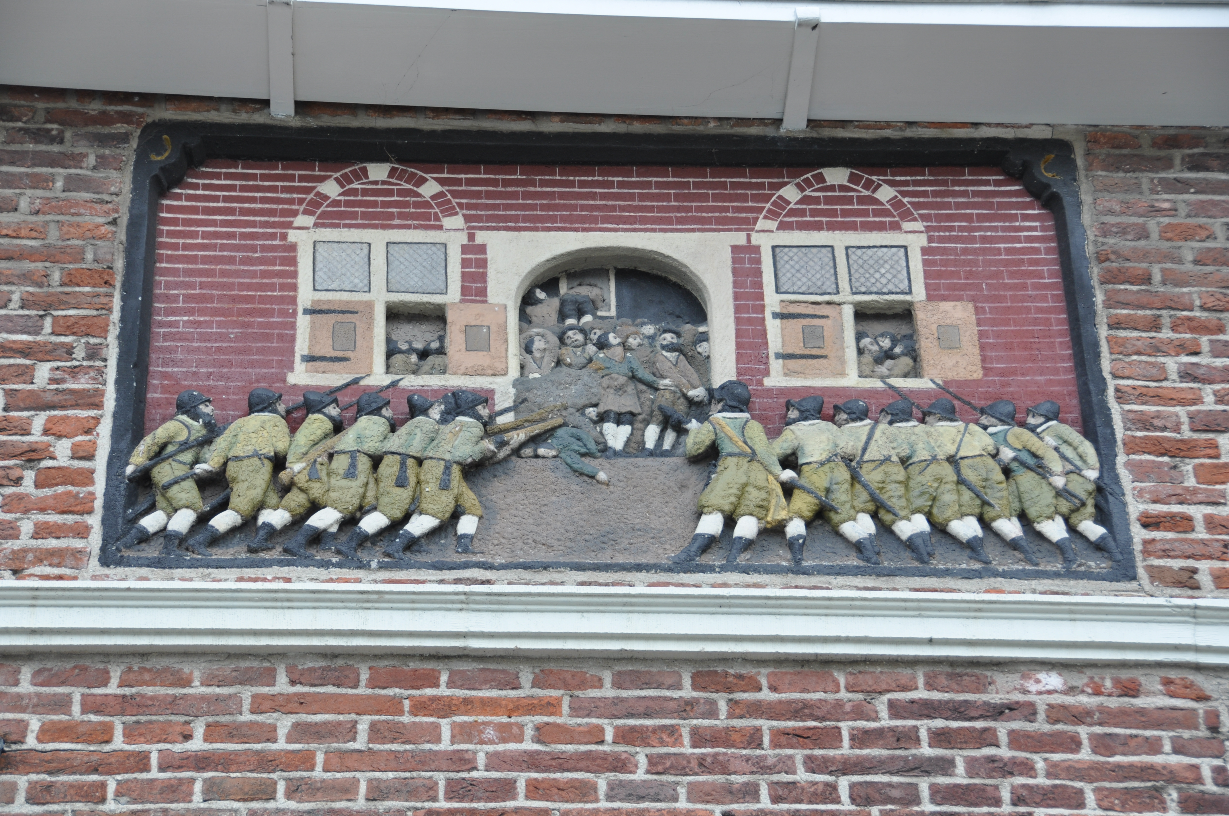 Gevelsteen die verhaald over de Spaanse moord in Naarden vesting